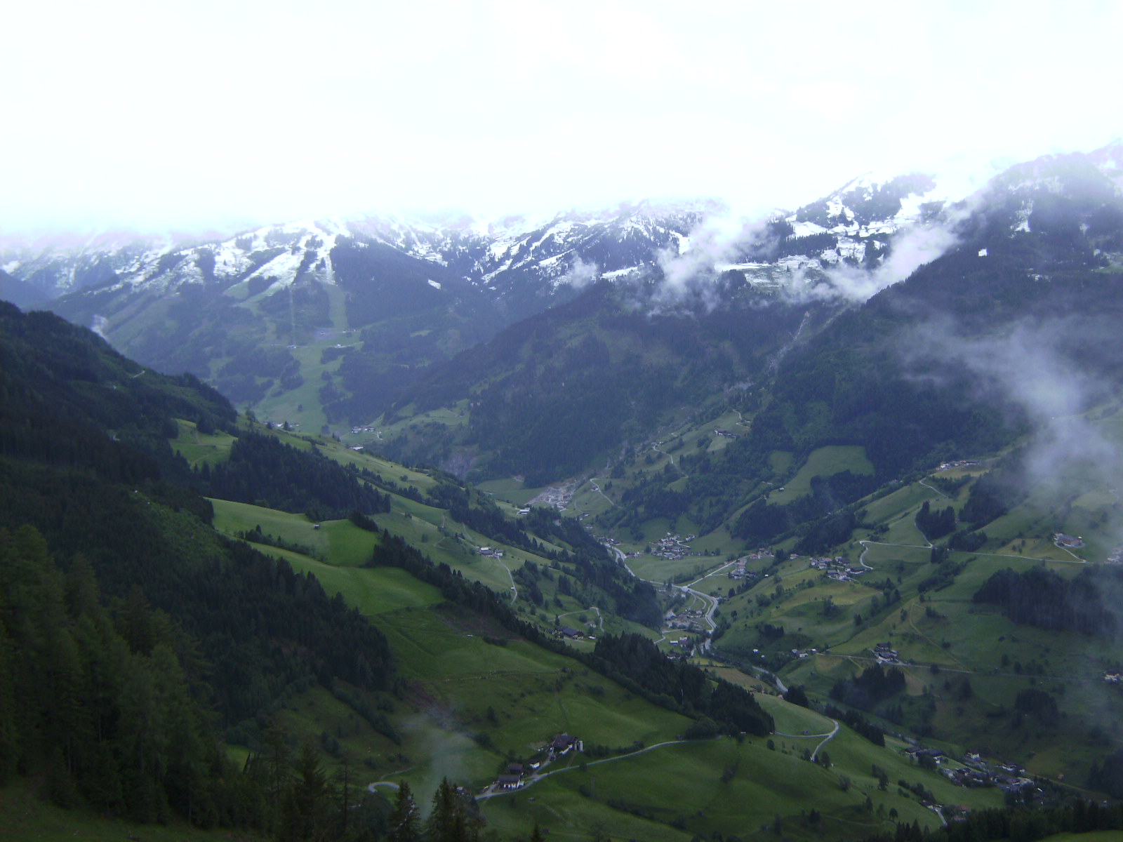 Grossarl Sueden